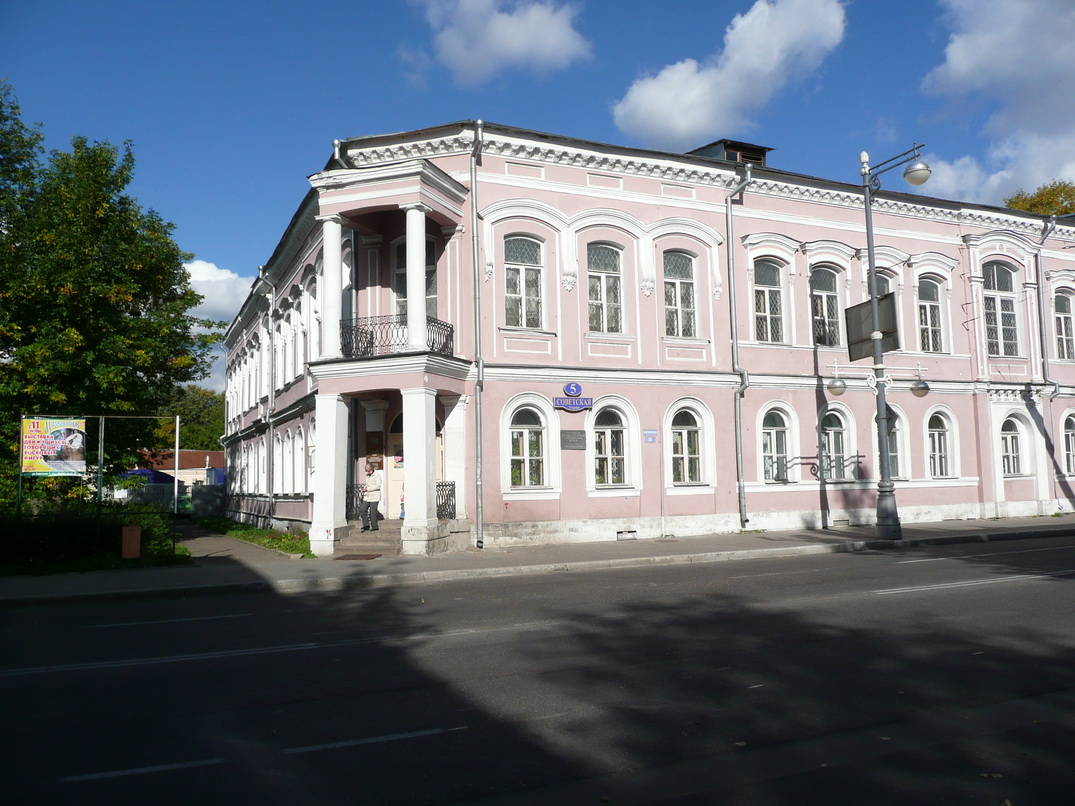 Tver Museum